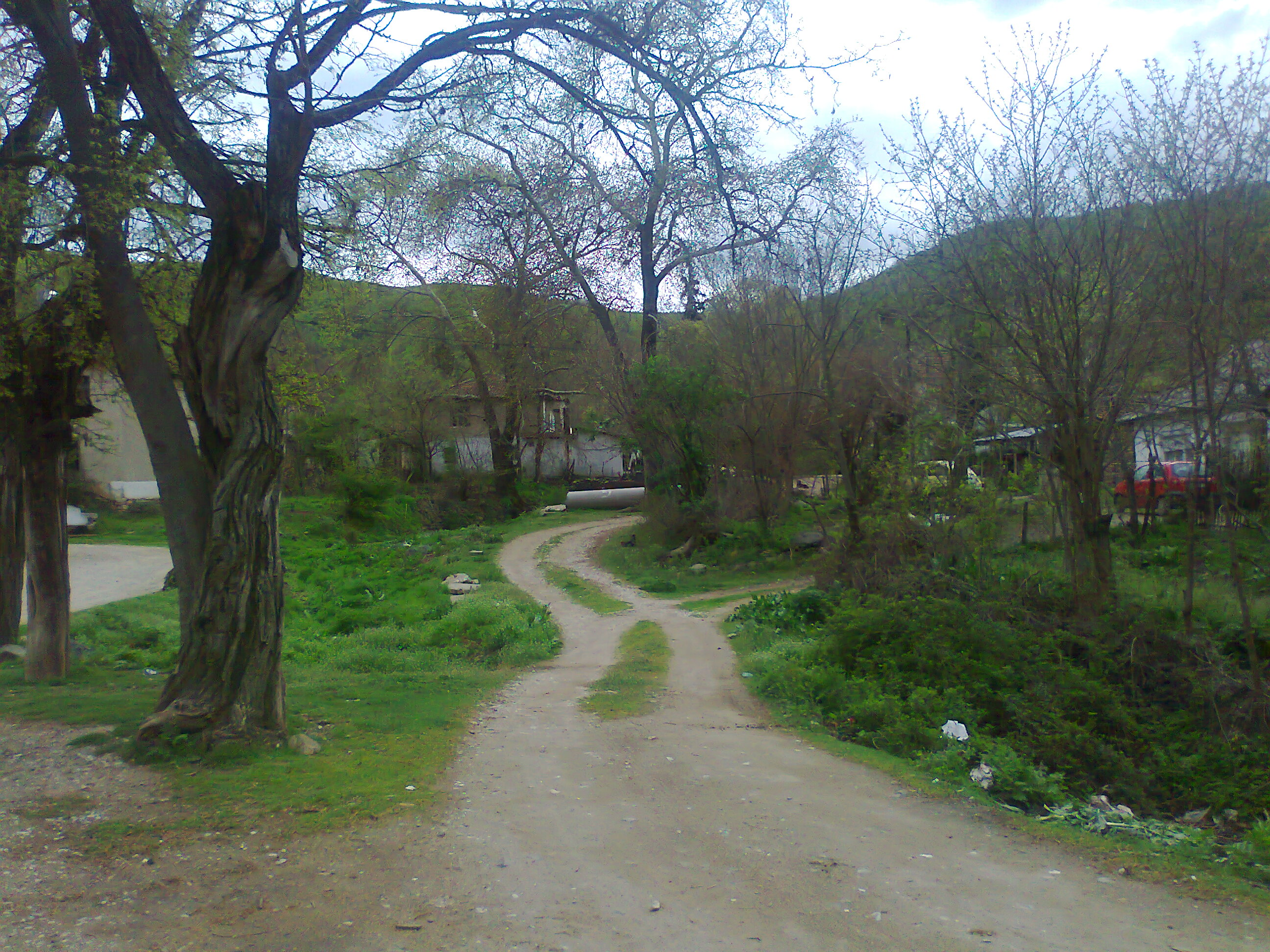 Sobri, Macedonia